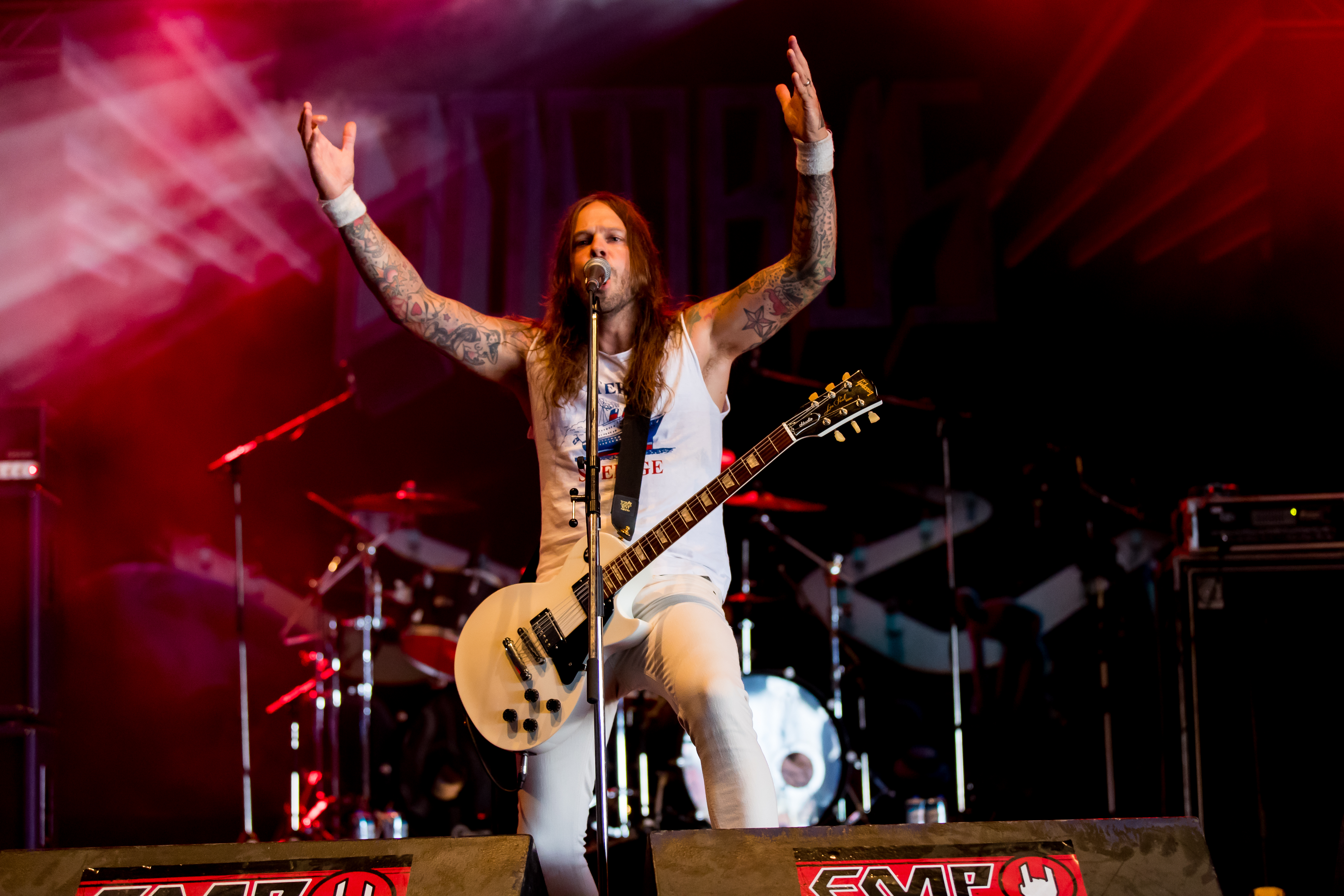 Bombus during Summer Breeze 2016 at , Dinkelsbühl, Bayern, Germany on 2016-08-19, Photo: Sven Mandel